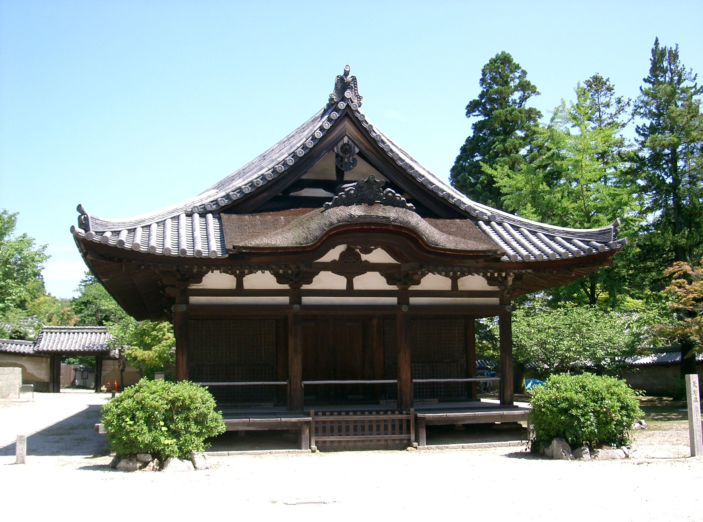 金剛寺 天野殿